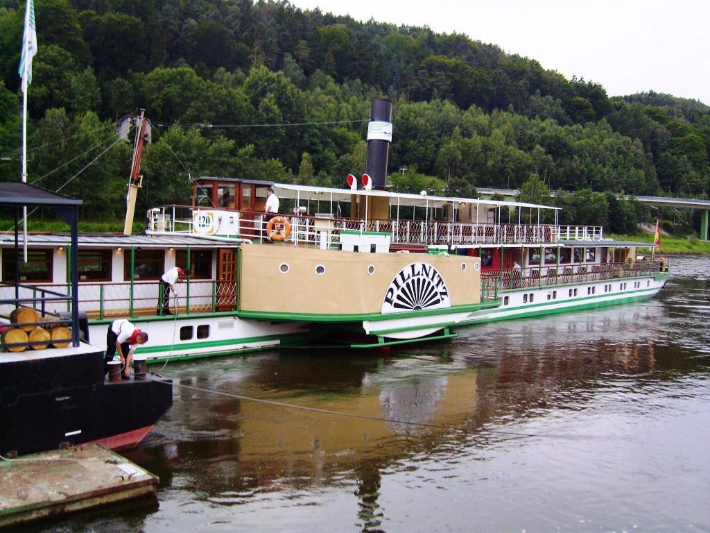 Der Raddampfer Pillniz in Bad Schandau